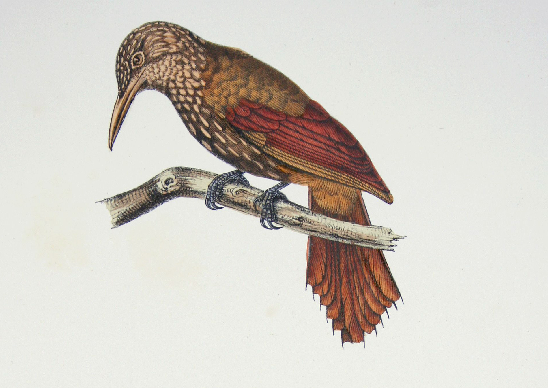 Dendrornis weddellii = Xiphorhynchus ocellatus weddellii